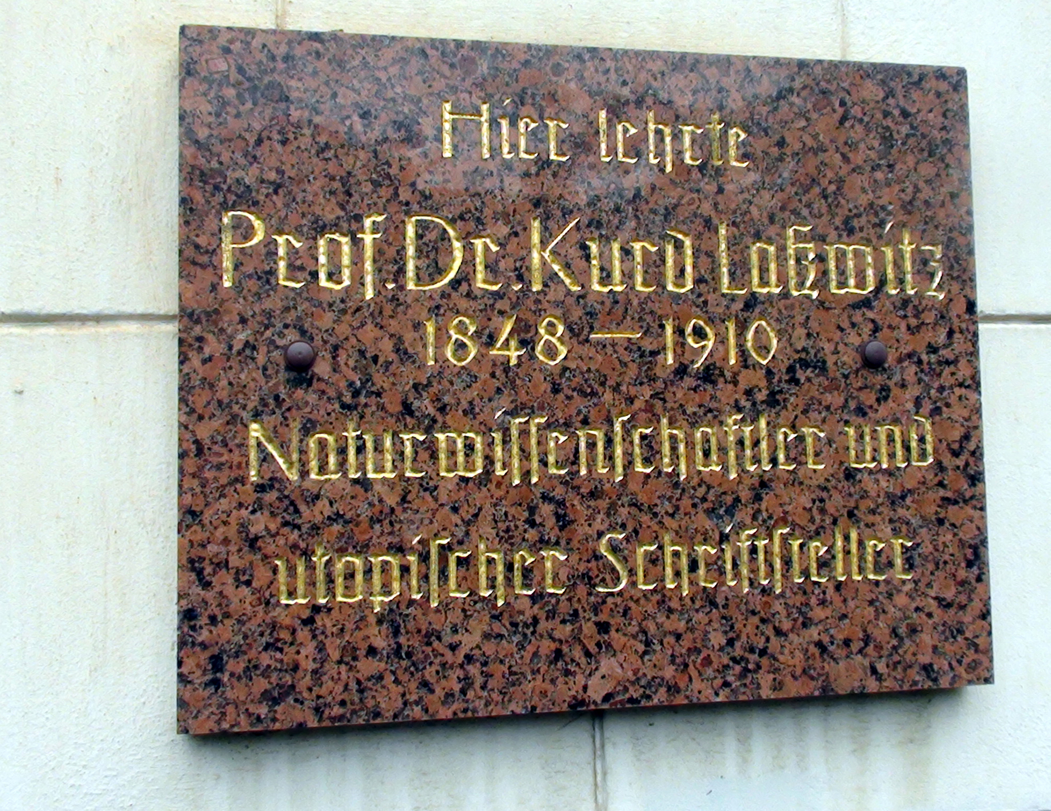 Gedenktafel am Gymnasium Ernestinum in Gotha für den Naturwissenschaftler und Science-Fiction-Autor Kurd Laßwitz (1848-1910), der von 1876 bis 1908 am Gymnasium lehrte. Die Gedenktafel berücksichtigt nicht, dass Laßwitz 1908 in den Ruhestand ging.